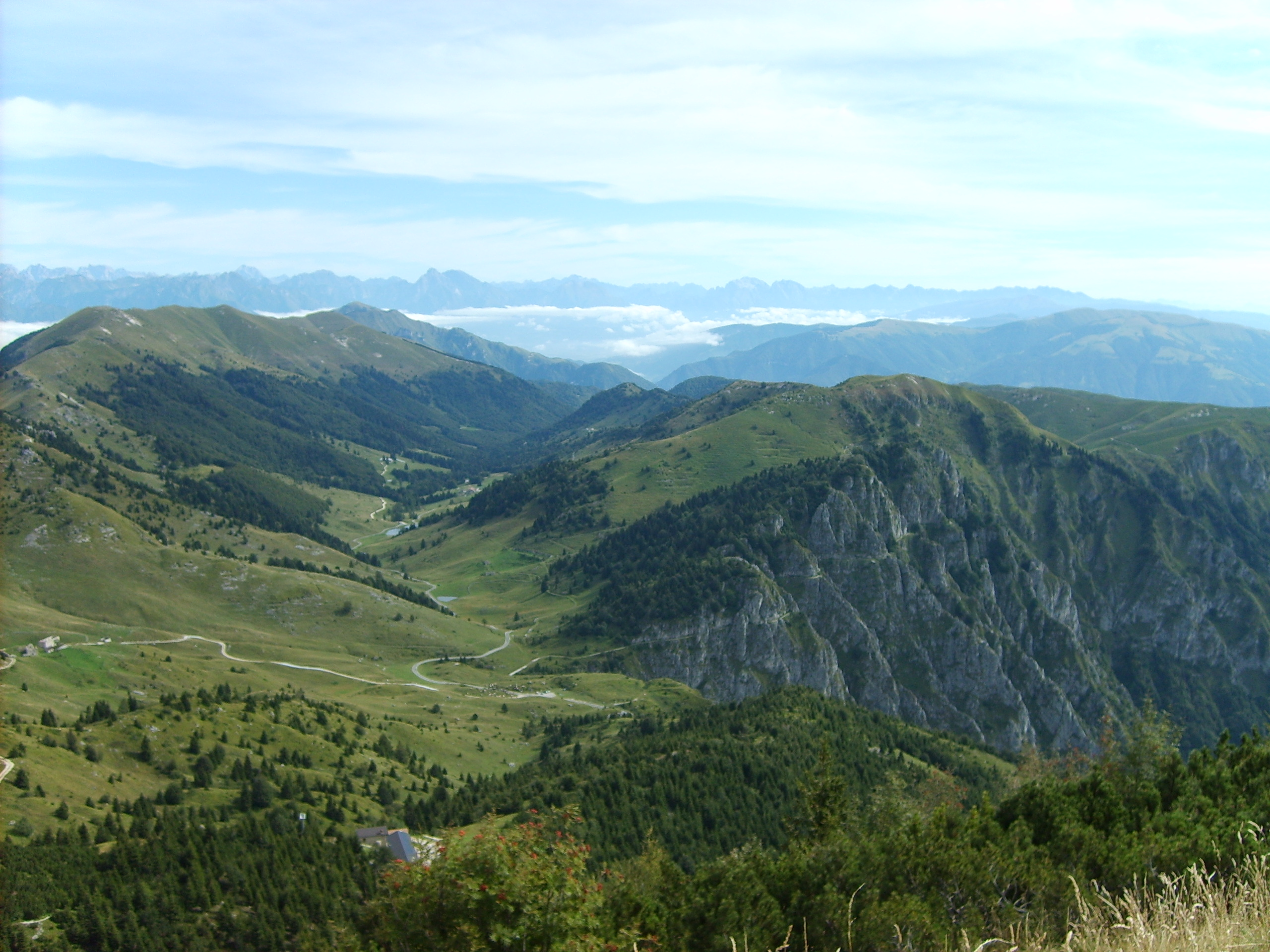 La vista dalla cima del Monte Grappa verso le Prealpi e le Dolomiti